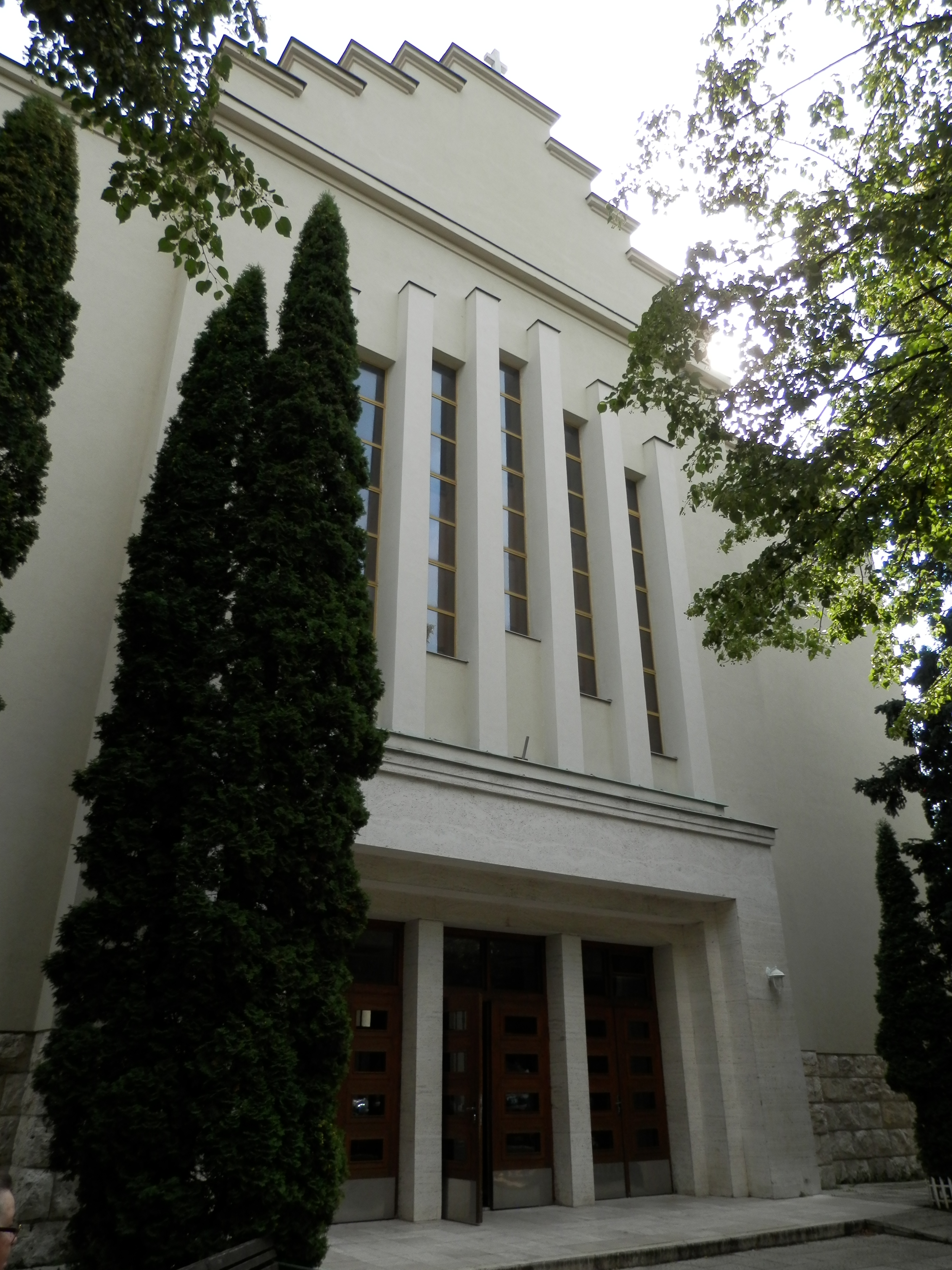 Konkatedrála Sedembolestnej Panny Márie v meste Poprad, región Spiš.